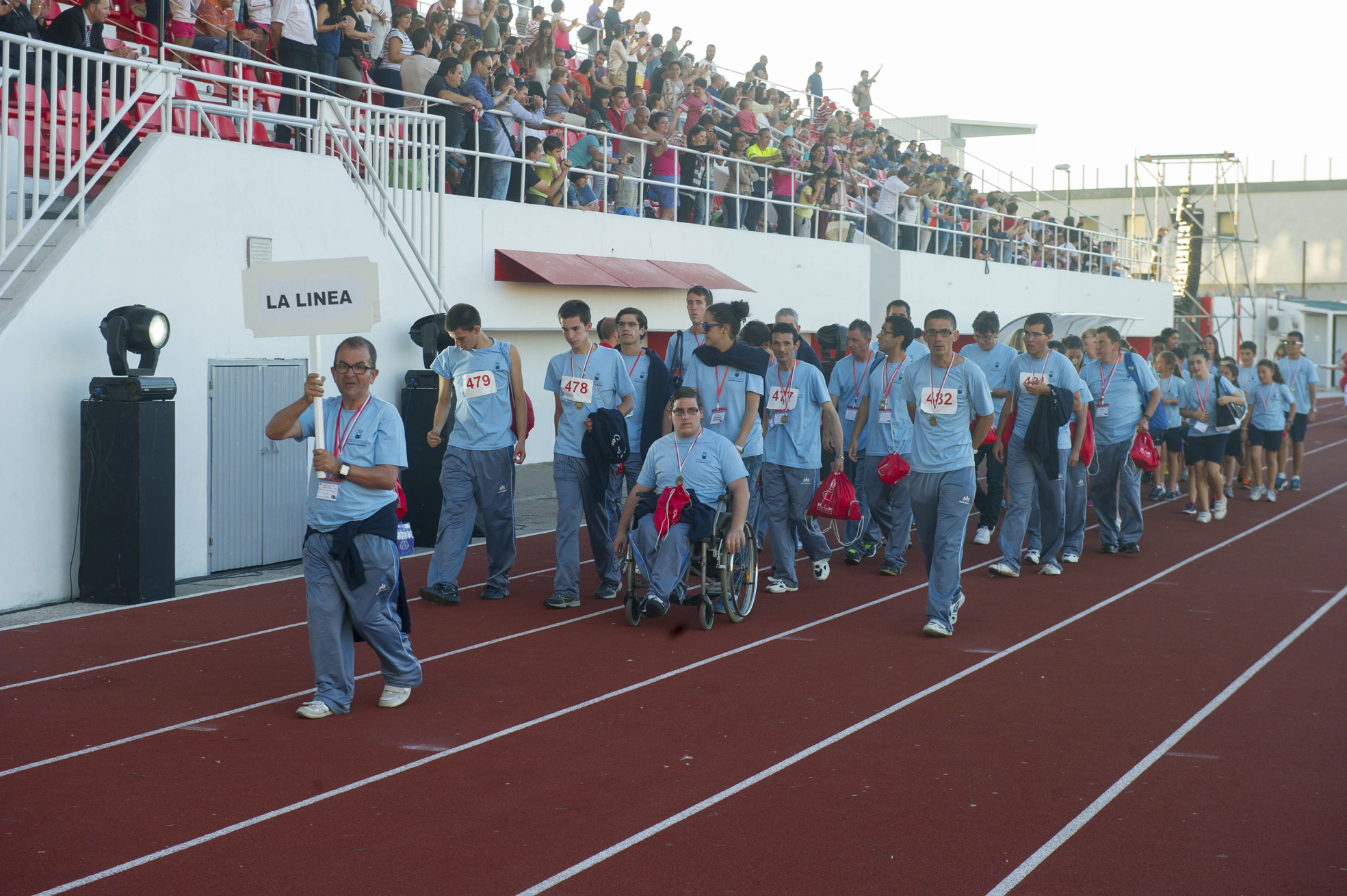 29 mayo Inauguración XVII Juegos del Estrecho02